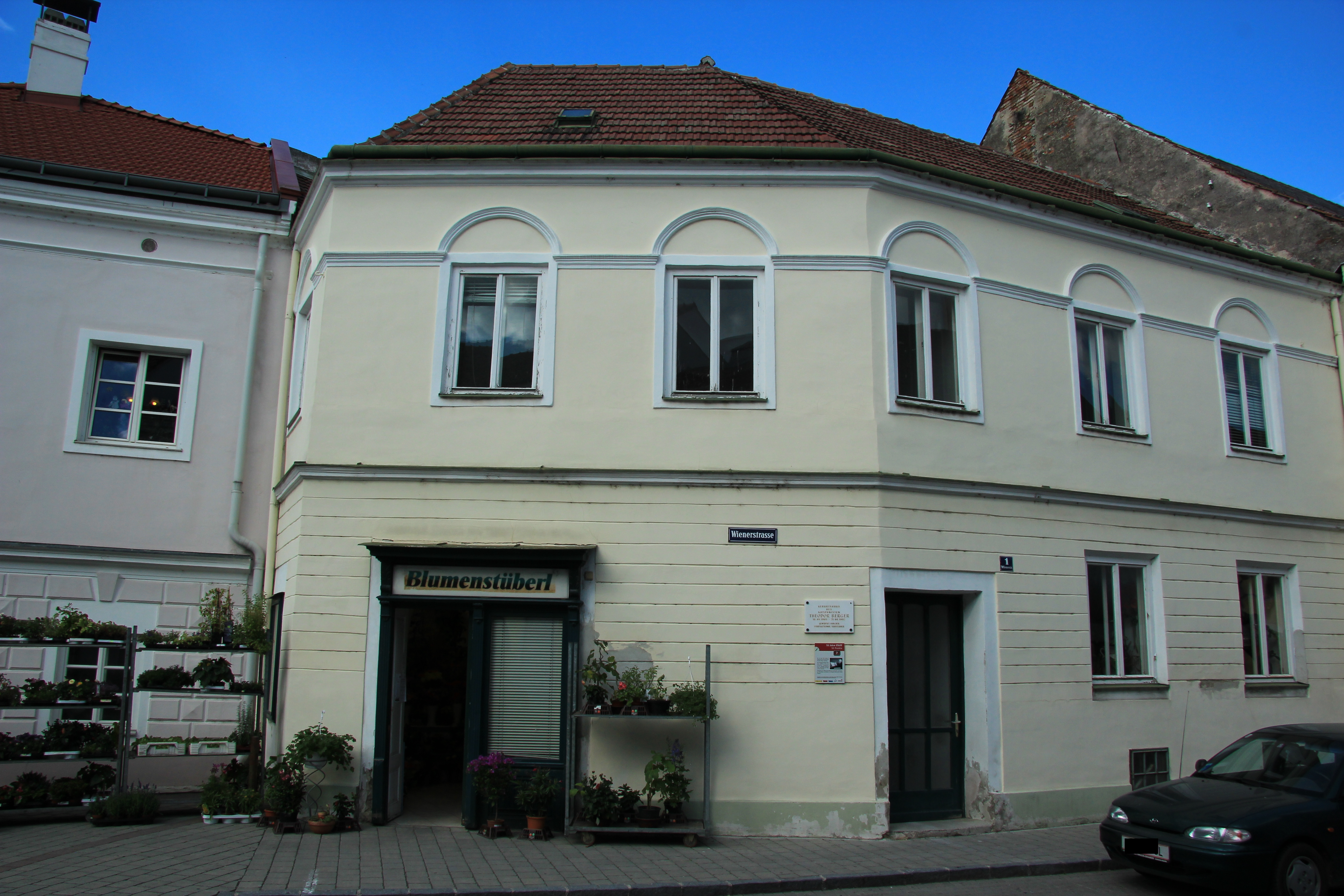 Geburtshaus des Komponisten Theodor Berger in Traismauer, Niederösterreich